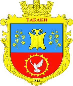 Герб села Табаки, Болградський район, Одеська область